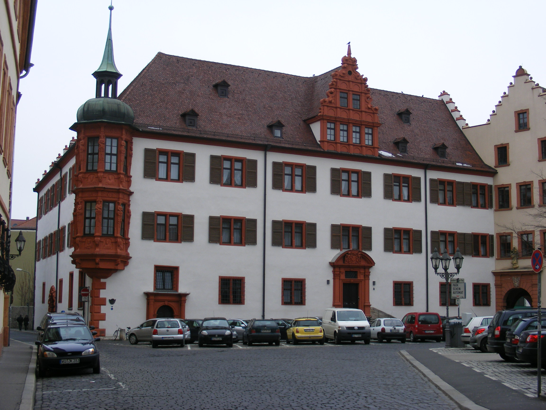 Würzburg, Kardinal-Döpfner-Platz 4, ehem. Hof Conti, ehem. Bischöfliches Palais (Teil der Domherrenhöfe).